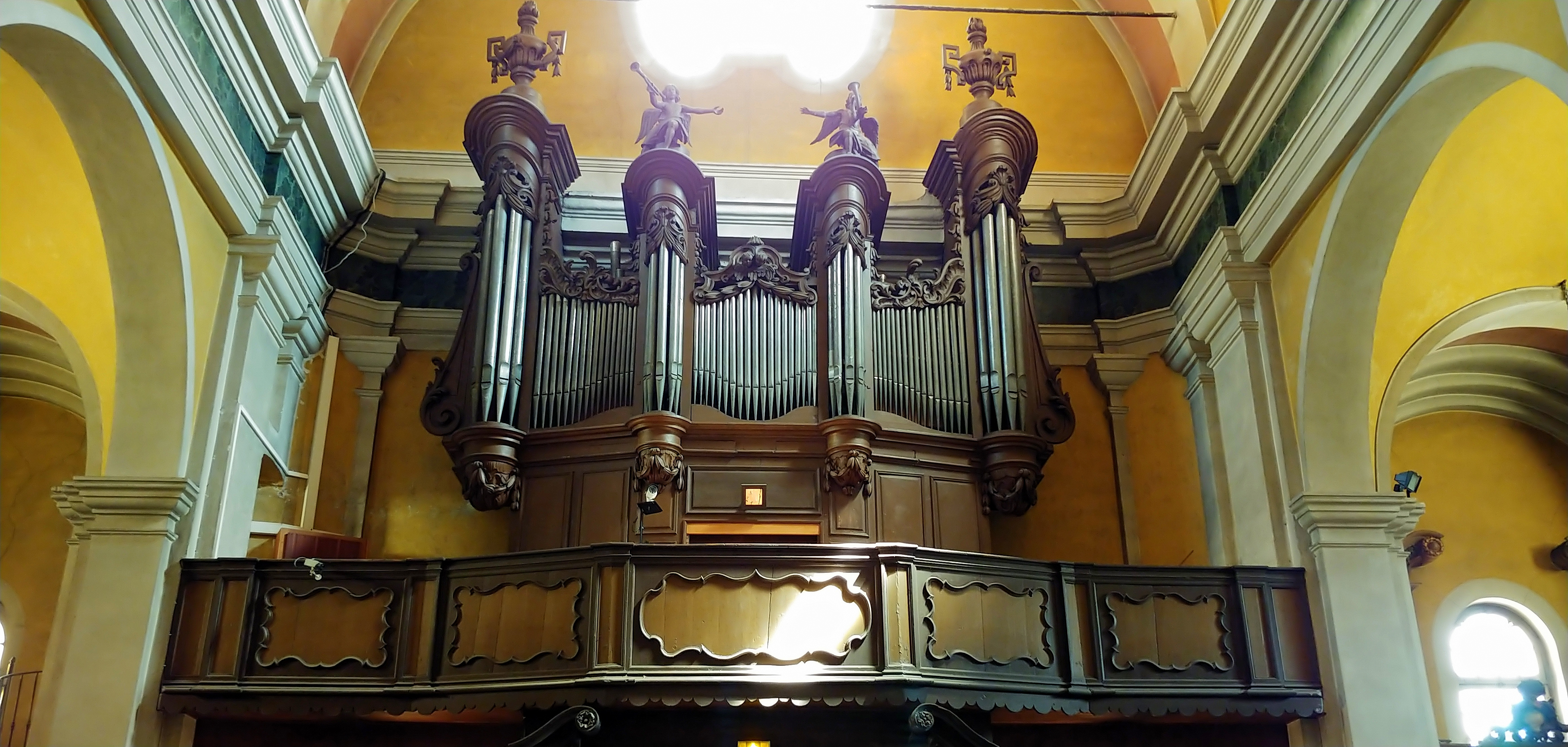 Intérieur de l'église Saint-Michel de Villefranche-sur-Mer, orgue